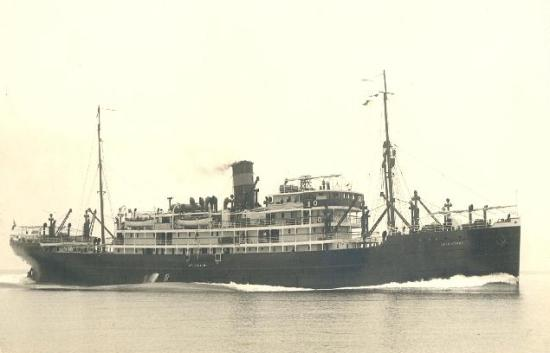 Fotografia do navio Araraquara, da Classe Araranguá, de propriedade da empresa brasileira Lloyd Nacional, afundado em 15 de agosto de 1942, pelo submarino alemão U-507, causando a morte de 131 pessoas. .